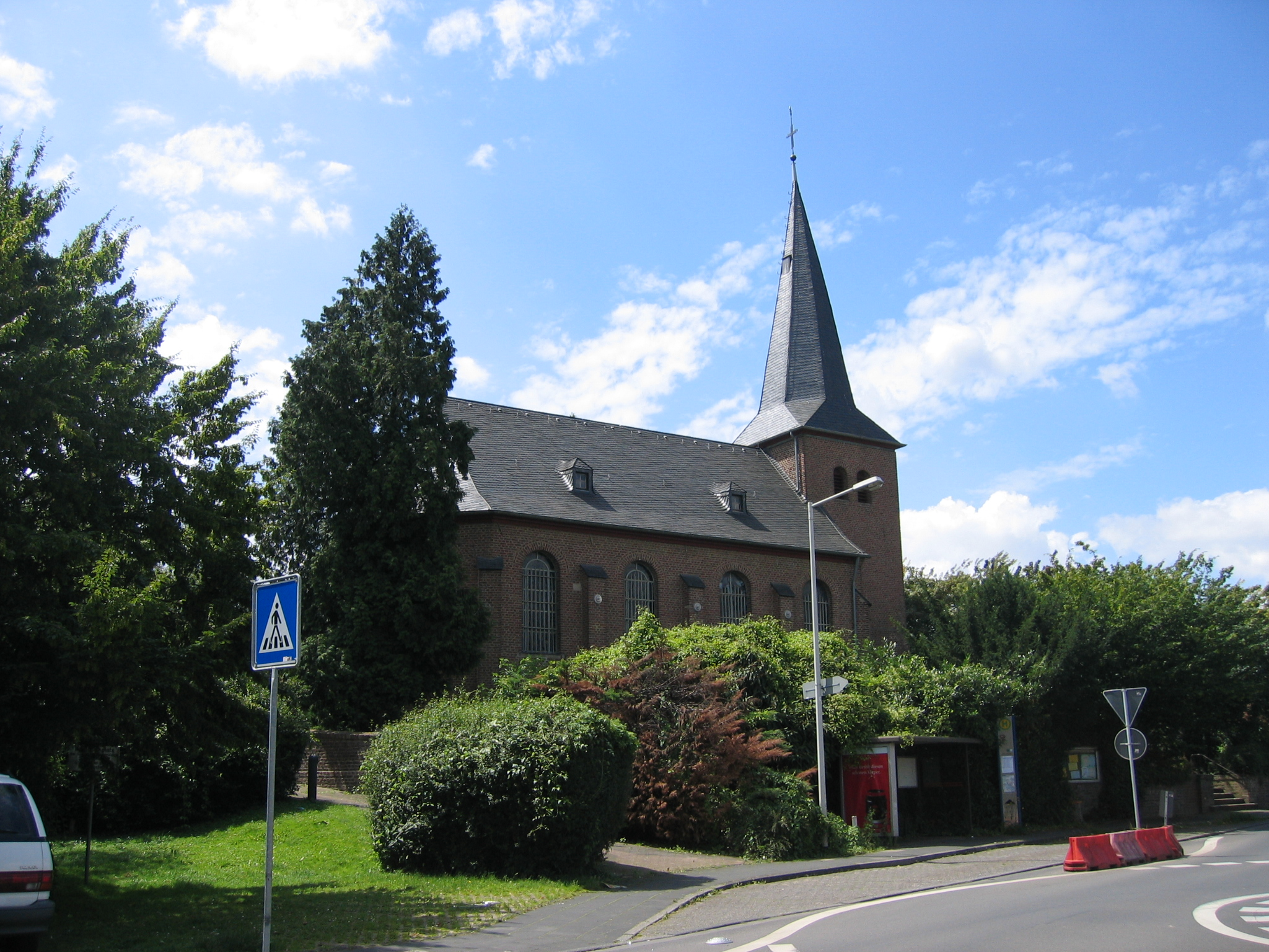 Ehemalige Pfarrkirche Alt-St. Ulrich in Frechen-Buschbell This is a photograph of an architectural monument. 18